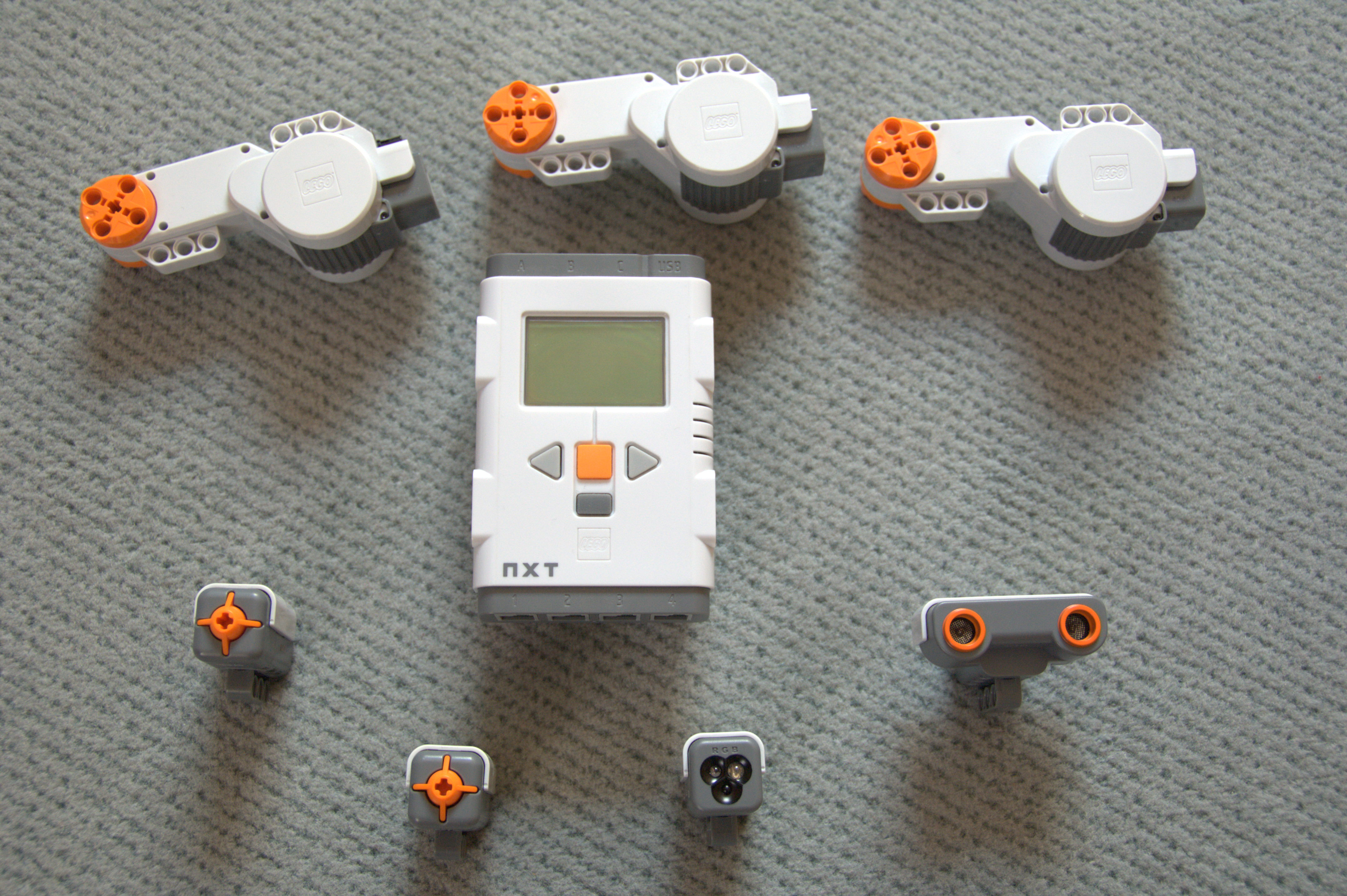 Der Lego Mindstorms NXT 2.0-Stein mit Sensoren.